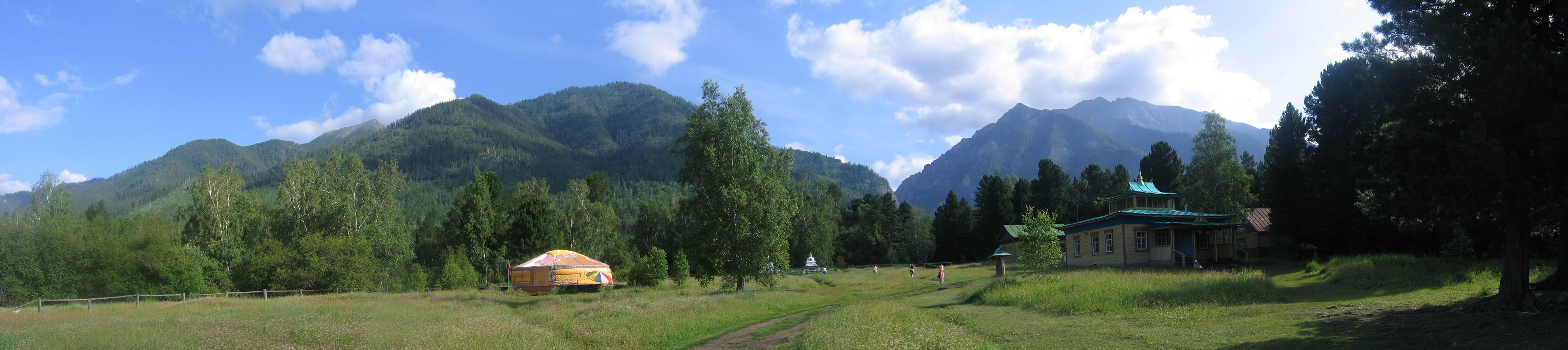 Аршан. Дацан Бодхидхарма. 07.2009